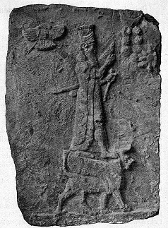 Gott Ašur auf dem Stier stehend – Ausgrabungen aus Assur